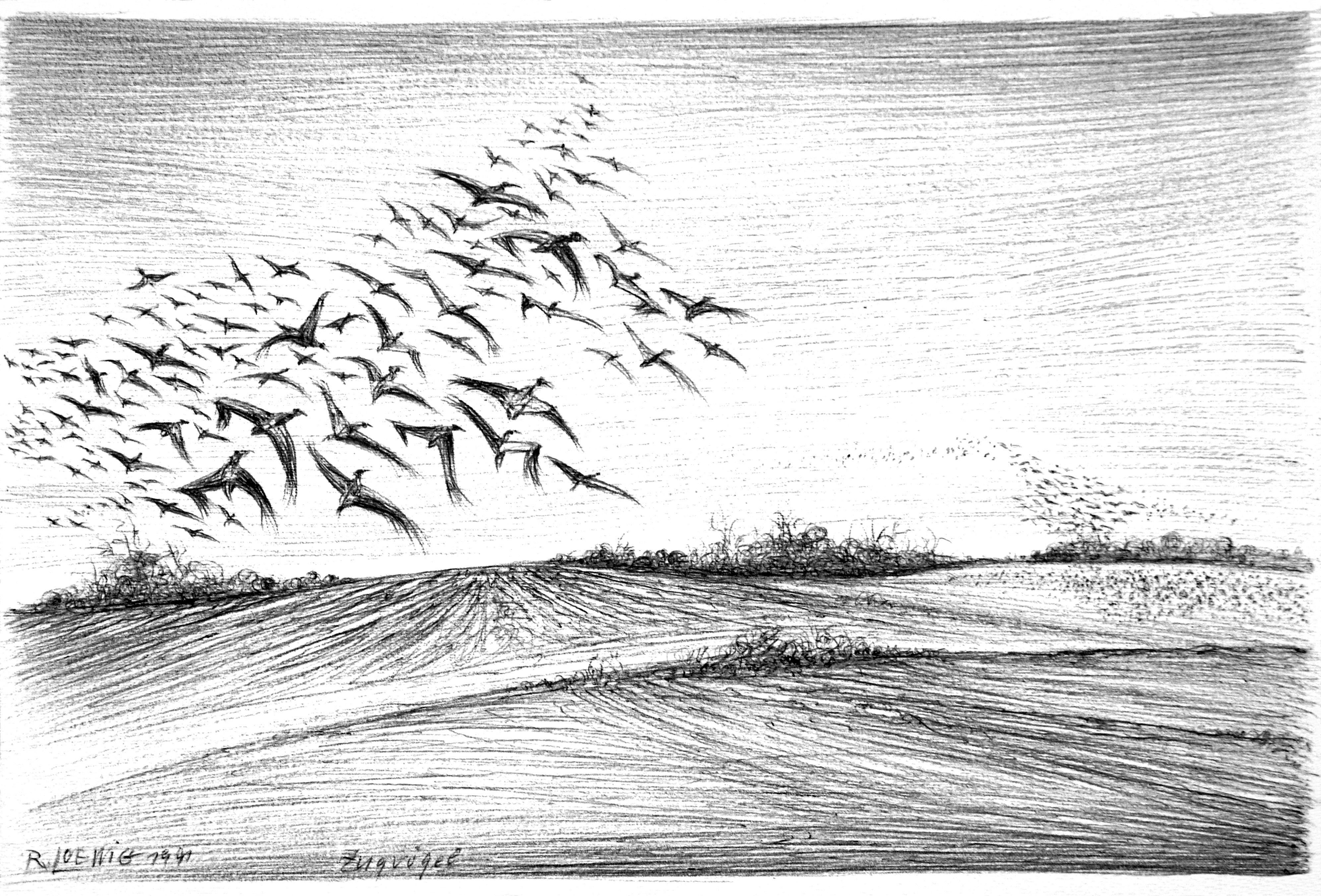 Zugvögeltitle QS:P1476,de:"Zugvögel" label QS:Lde,"Zugvögel"